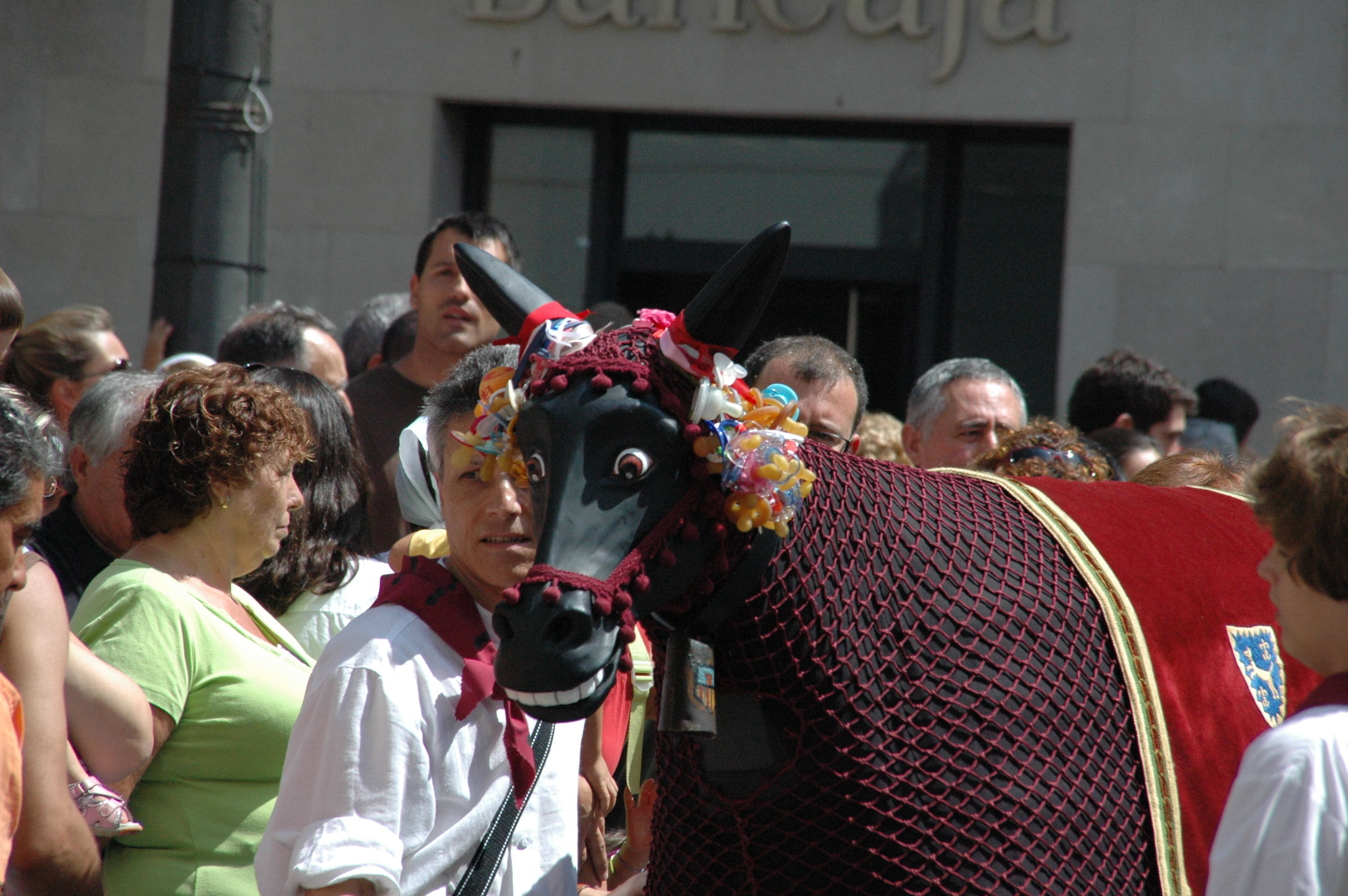 Festa major Vilanova